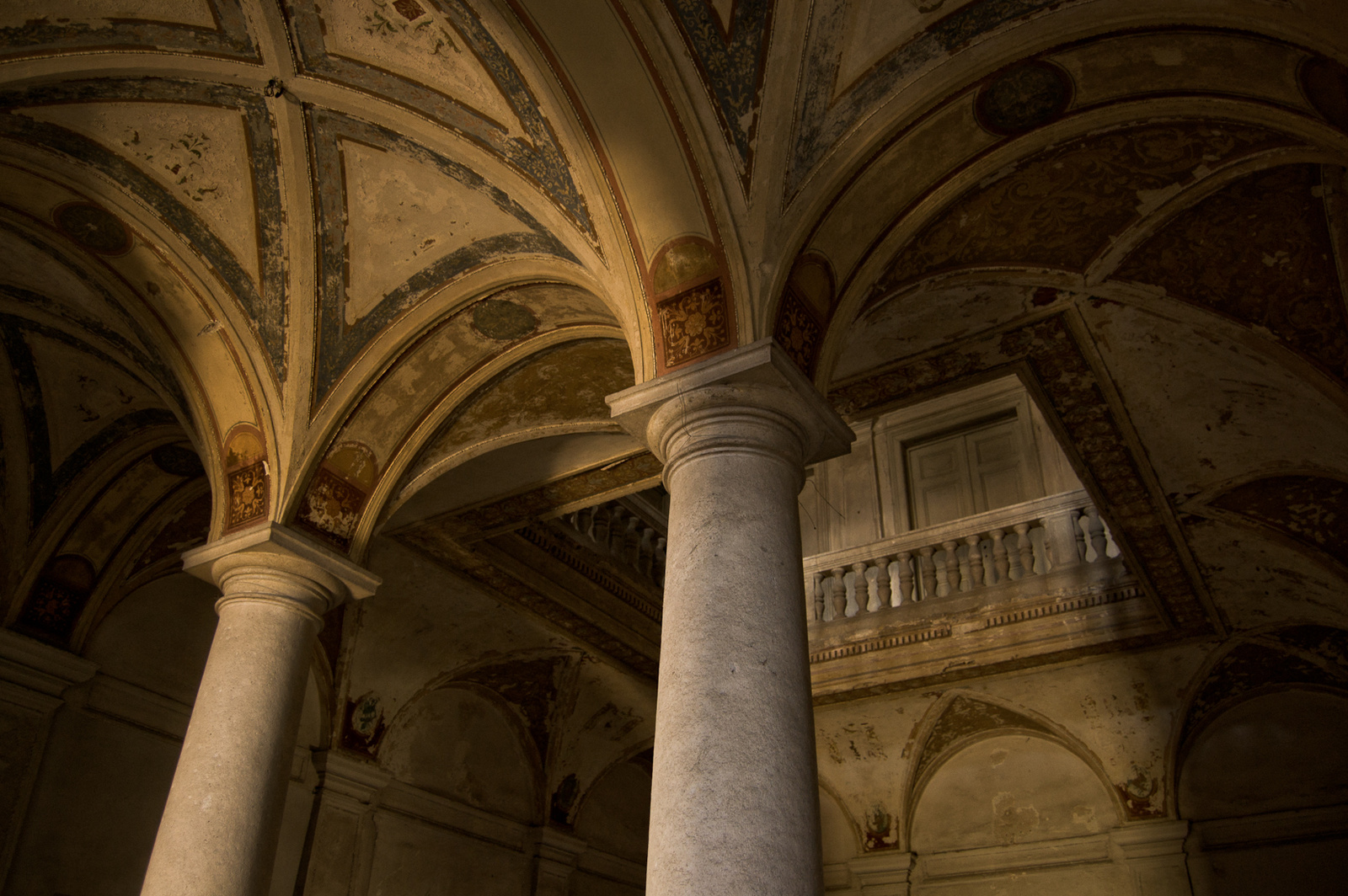 Schossberger-kastély (Tura, Kossuth u.)